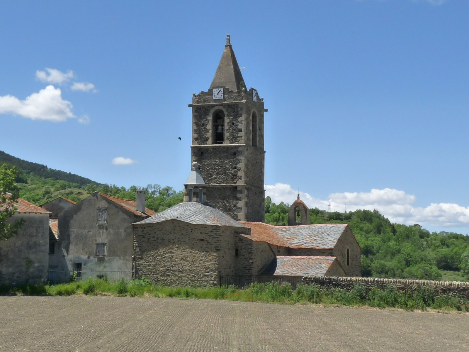 Clocher de la chapelle de la Vierge, Err, Pyrénées-Orientales, France